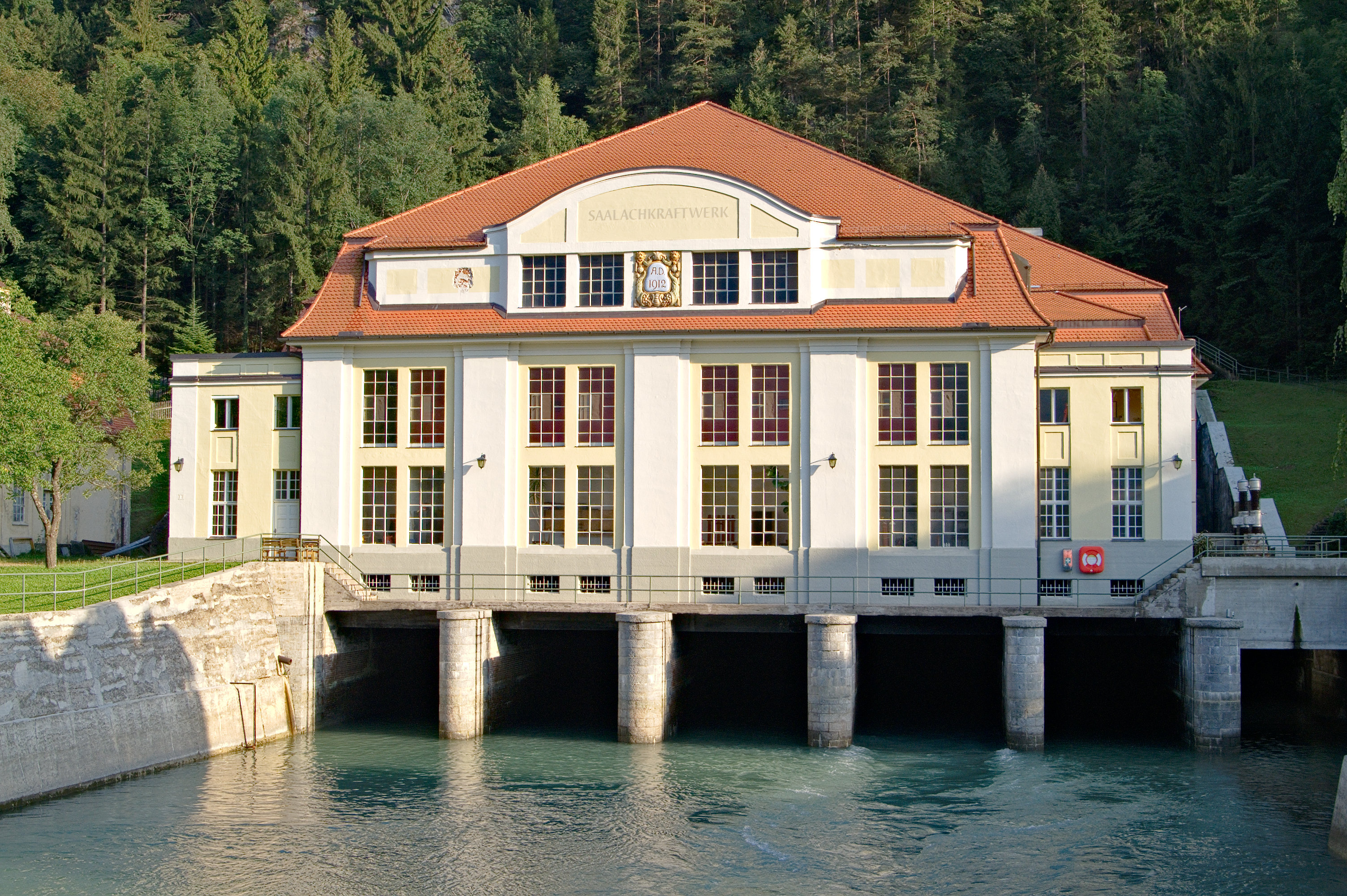 Saalach Hydro Power Station Bad Reichenhall